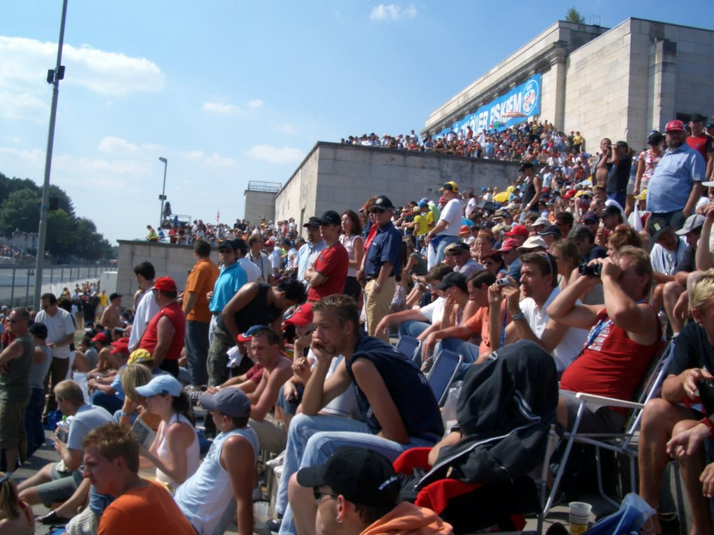 Zuschauer auf der Steintribüne des Norisrings.